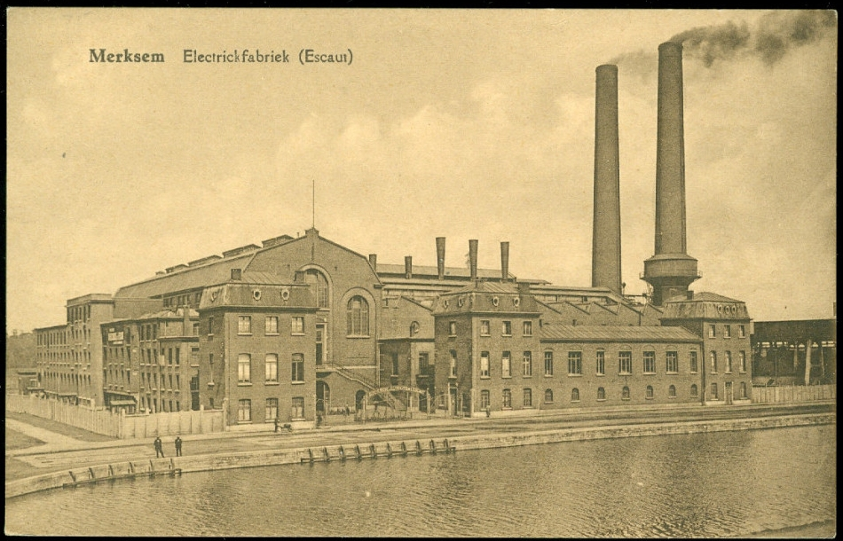 Centrale électrique de Merksem